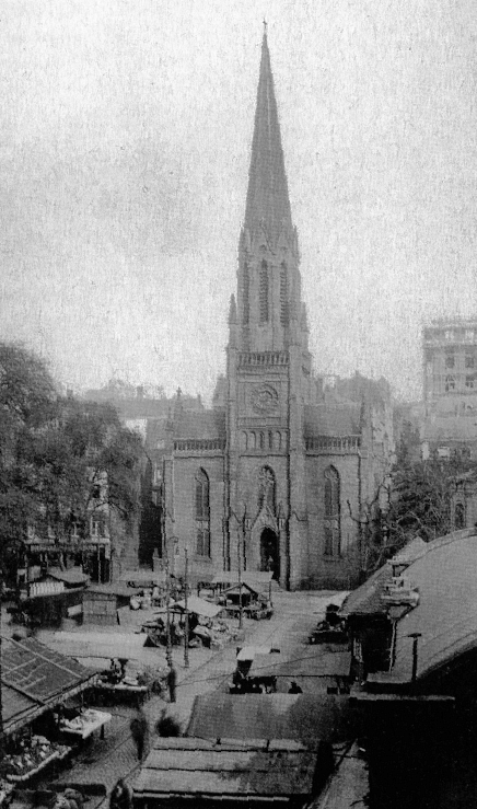 Friedenskirche, Barmen, Foto von 1871